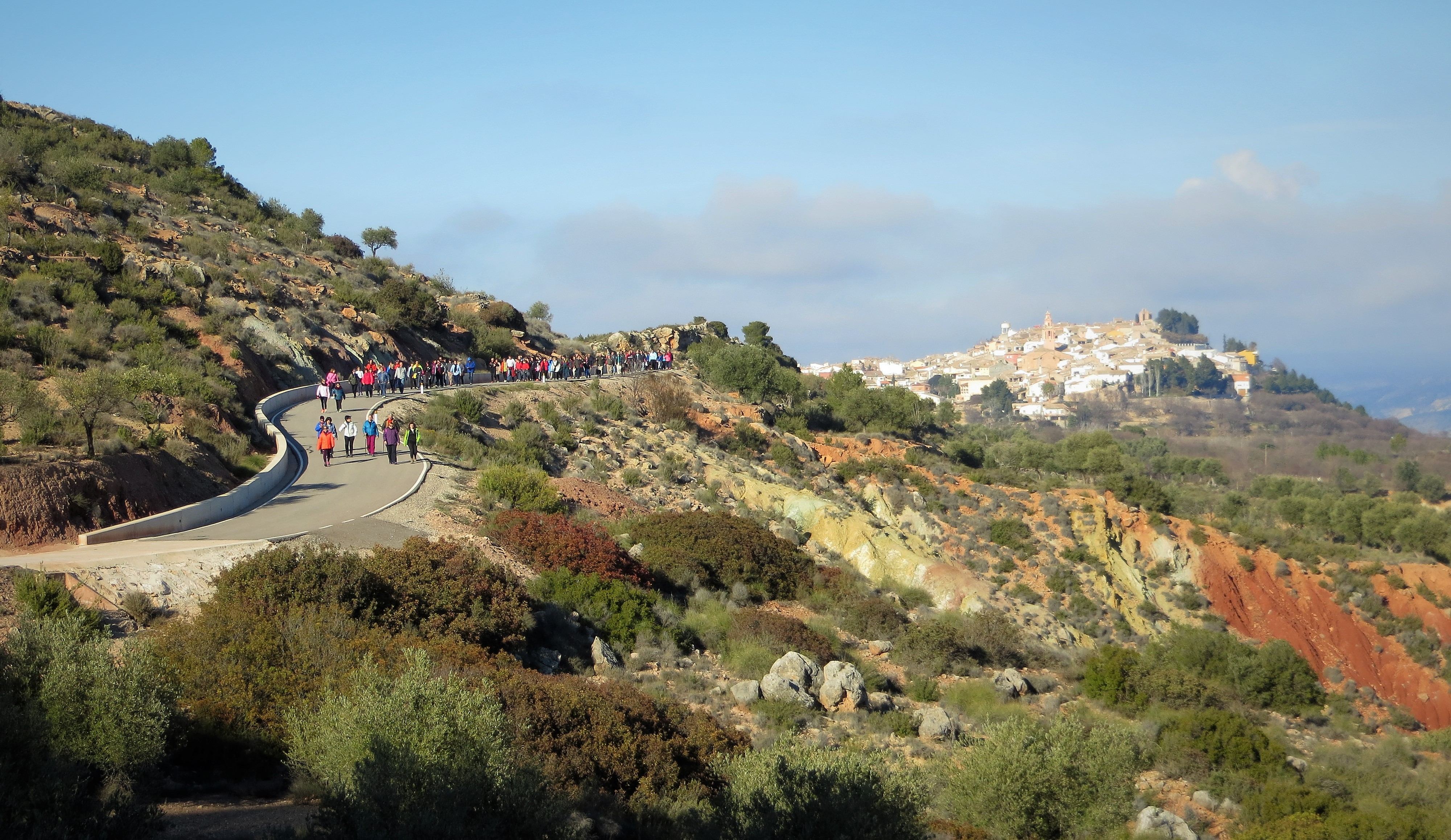 Ruta senderista de la abuela Liñana con motivo de la Festividad del Santo Ángel - Salida del camino de vuelta a Ayora. Al fondo imagen de la marcha y la población de Jarafuel.